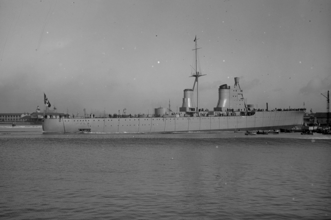 Varo dell'incrociatore pesante "Pola", Livorno 1931 (AS Livorno, Archivio storico del Cantiere navale Luigi Orlando)